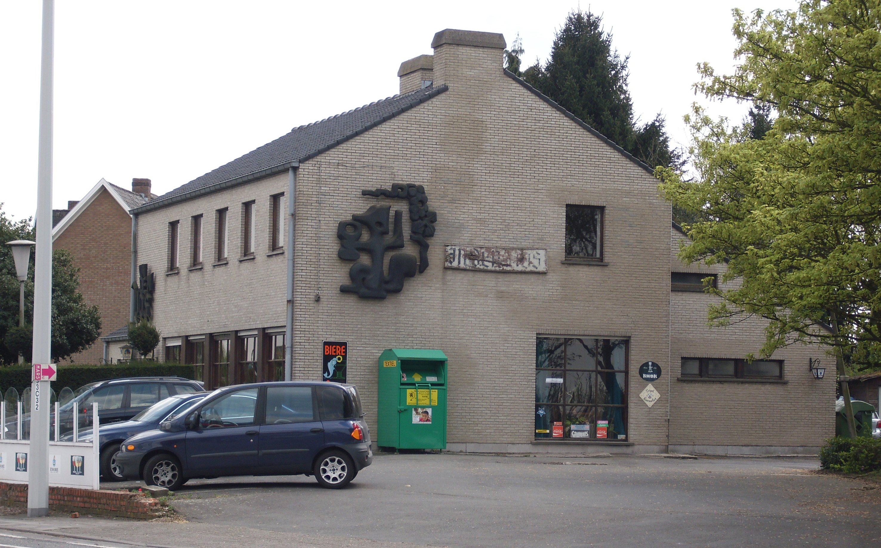 In Den Vos - Oombergen - Zottegem - Oost-Vlaanderen - Vlaanderen - België. De herberg is gelegen op de kruising van de wegen Aalst-Oudenaarde (N46) en Gent-Geraardsbergen (N42).